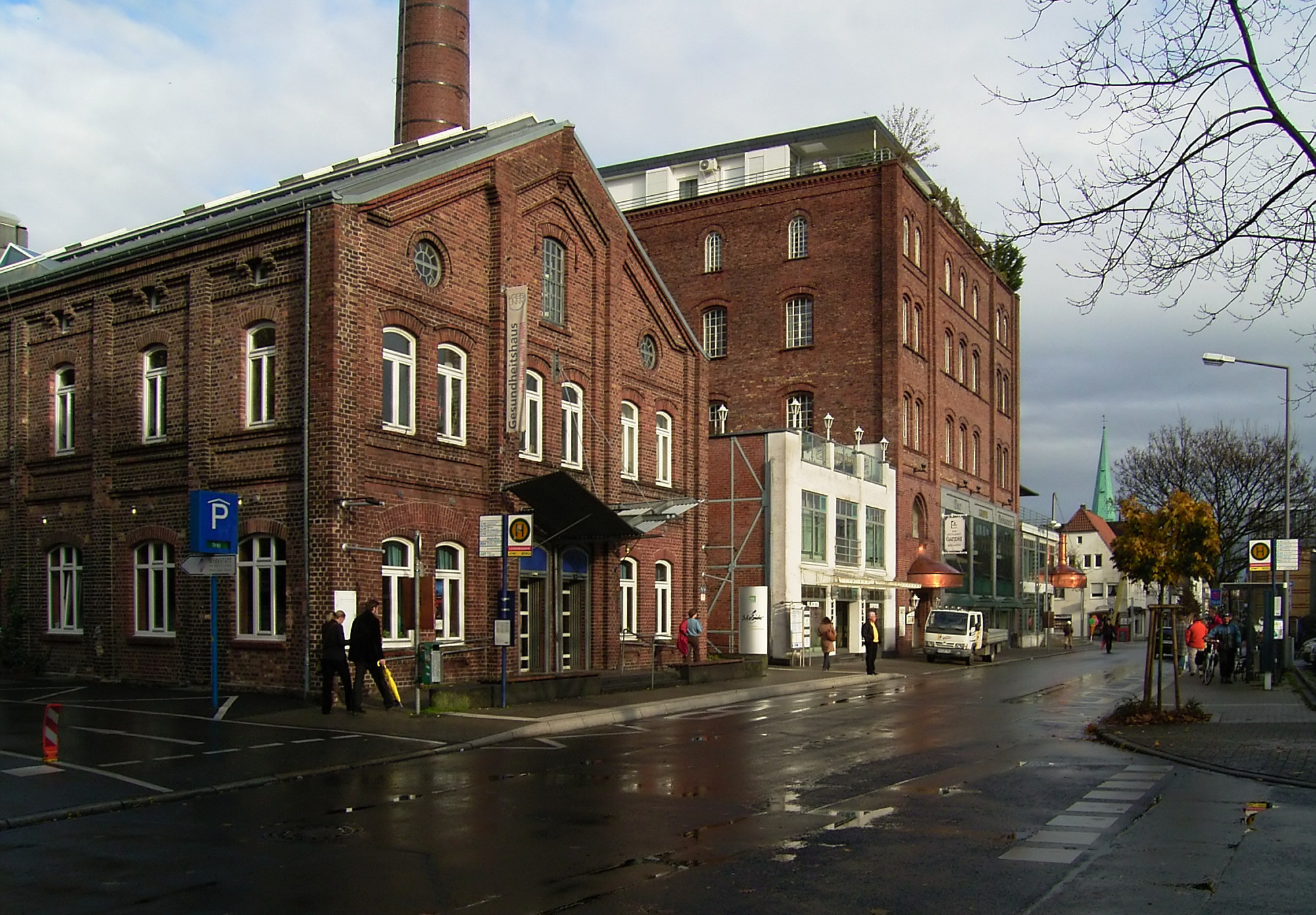 Lindenbrauerei Unna, heute ein soziokulturelles Zentrum, November 2006